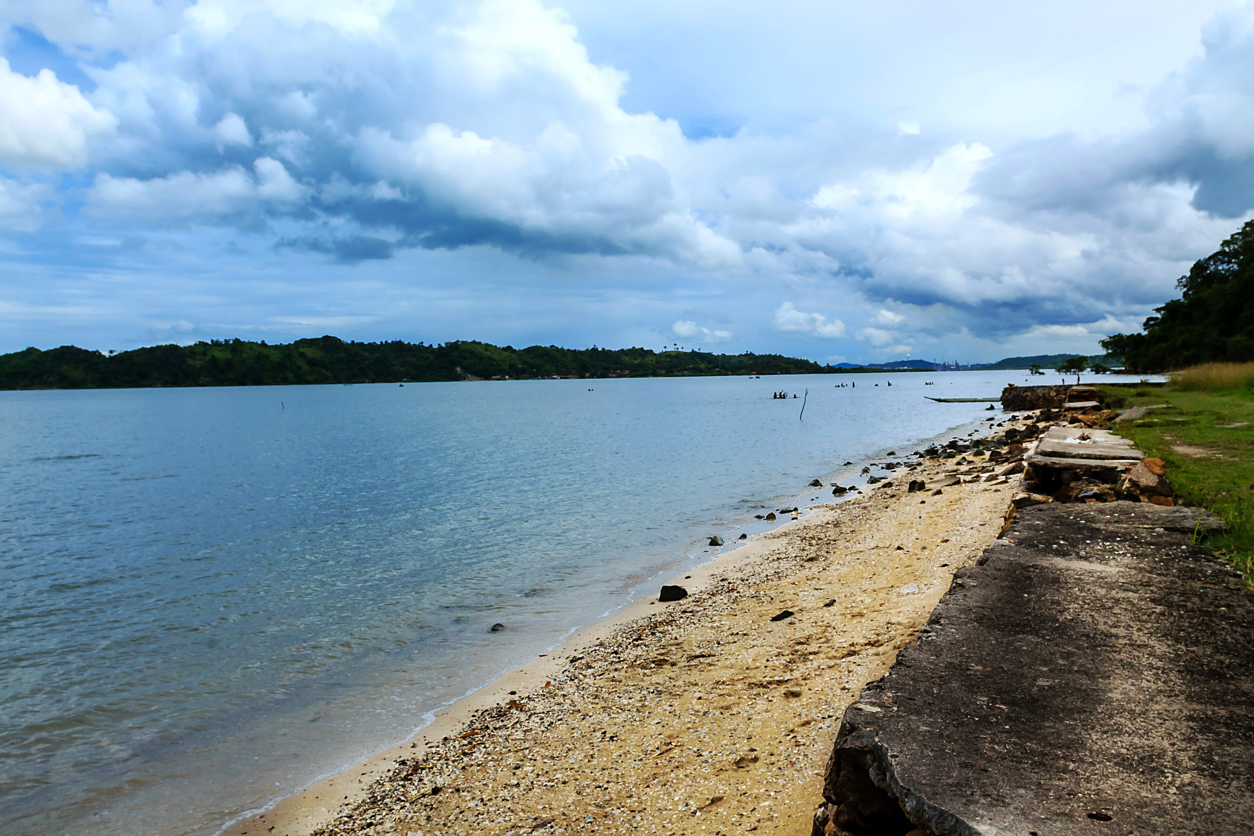 Caboto, Bahia, Brasil.